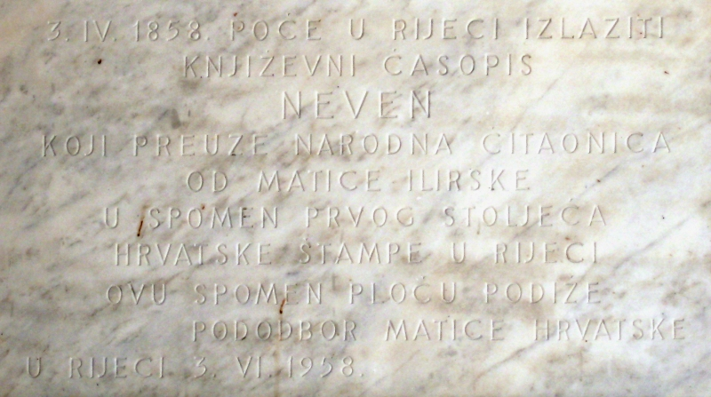 spomen ploča za književni časopis Neven u Rijeci na ulazu u zgradu Radio Rijeke, Rijeka